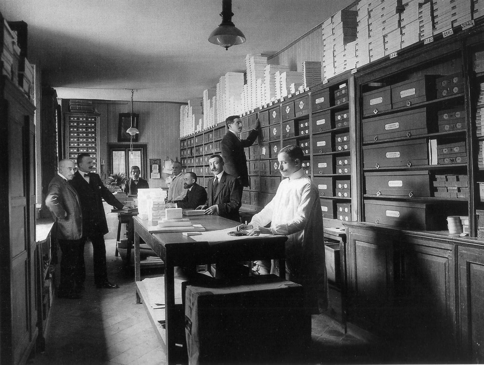 Establecimiento de la casa Loewe en 1905, obra del fotógrafo Christian Franzen.